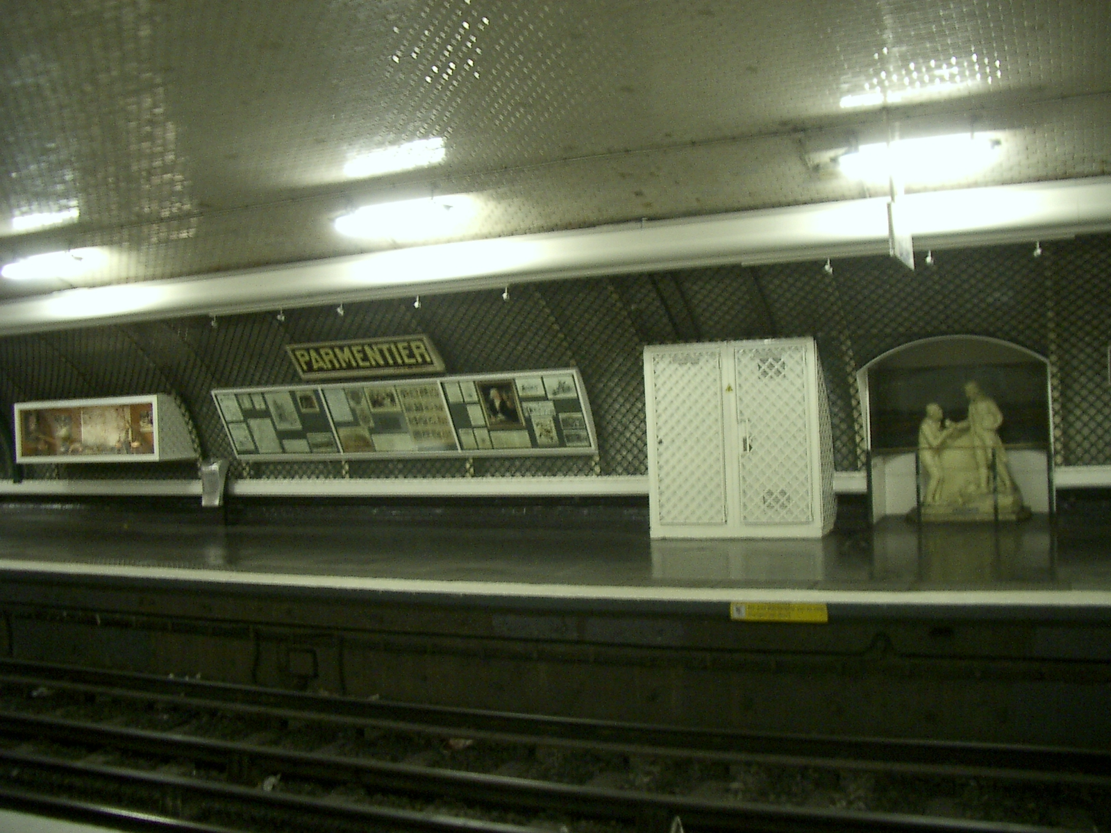 Station de Métro Parmentier à Paris, une exposition autour de Monsieur Parmentier